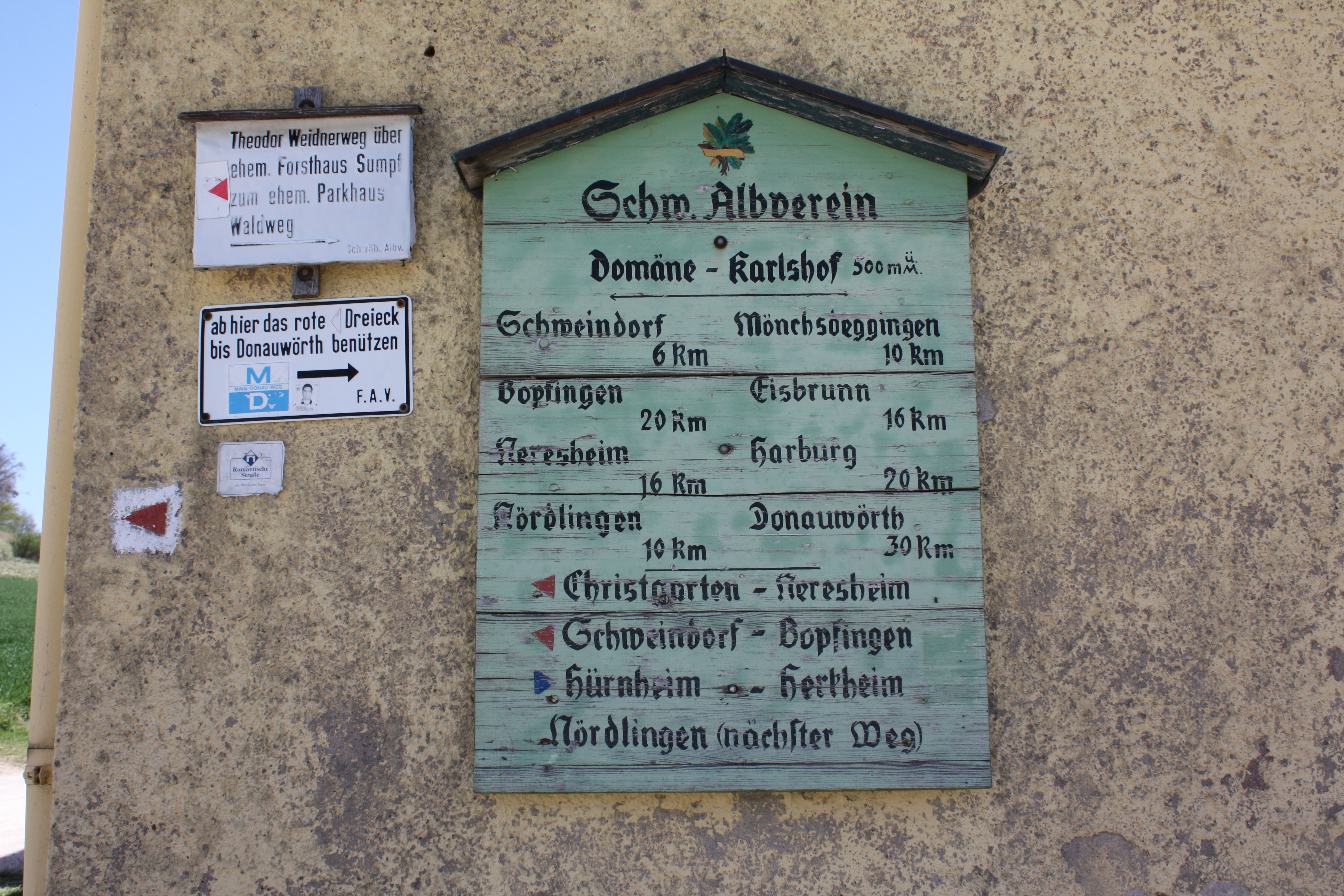 Historische Wegtafel des Schwäbischen Albvereins in Karlshof (Hohenaltheim), Landkreis Donau-Ries, Bayern, Deutschland